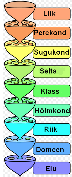 Bioloogiline klassifitseerimine